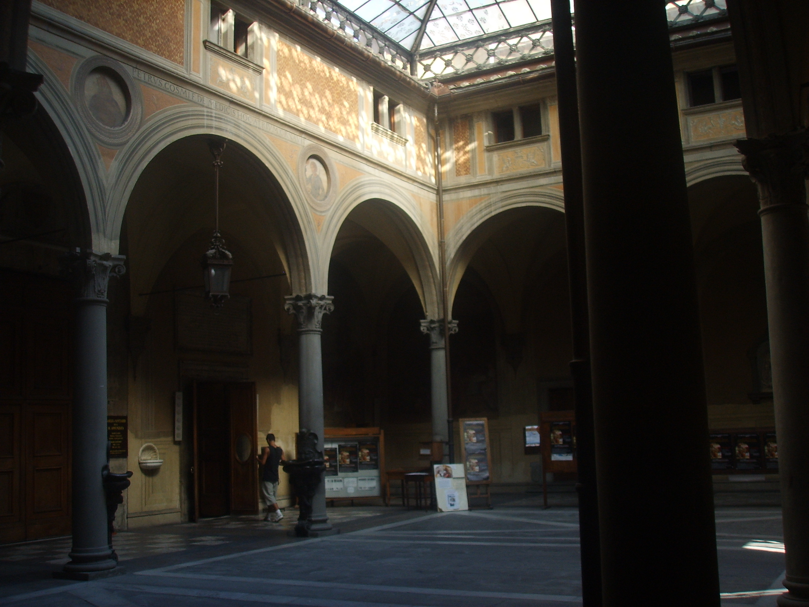 Santissima annunziata, chiostrino dei Voti in Florence, Italy